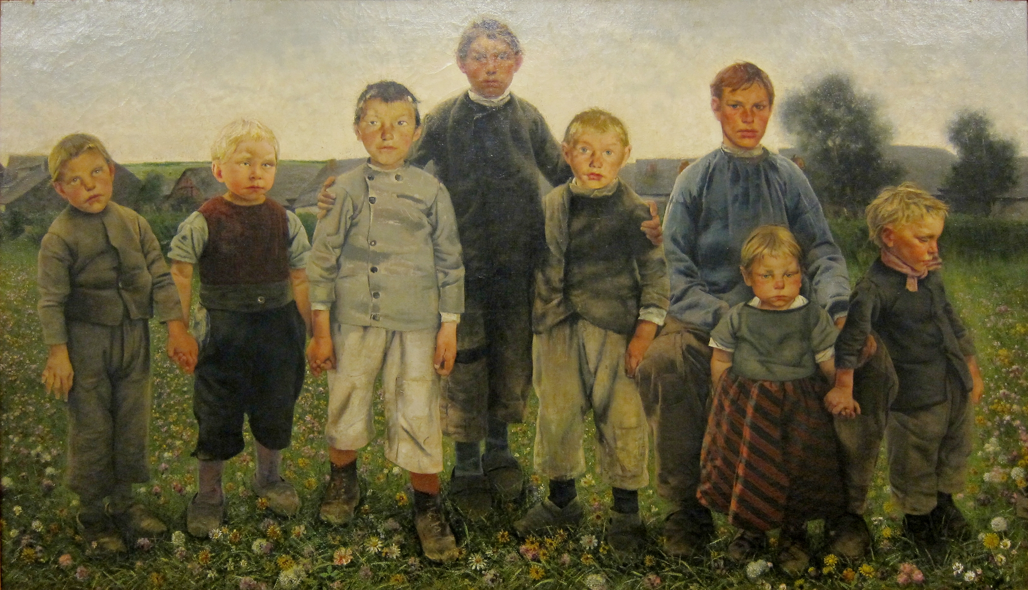 de la série «Les âges du paysan